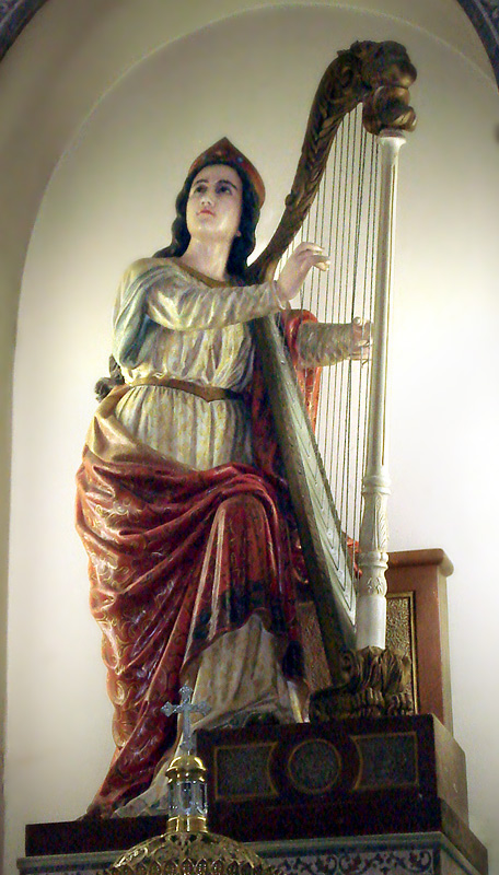 Imagem de Santa Cecília na igreja de mesmo nome em Porto Alegre, Brasil.